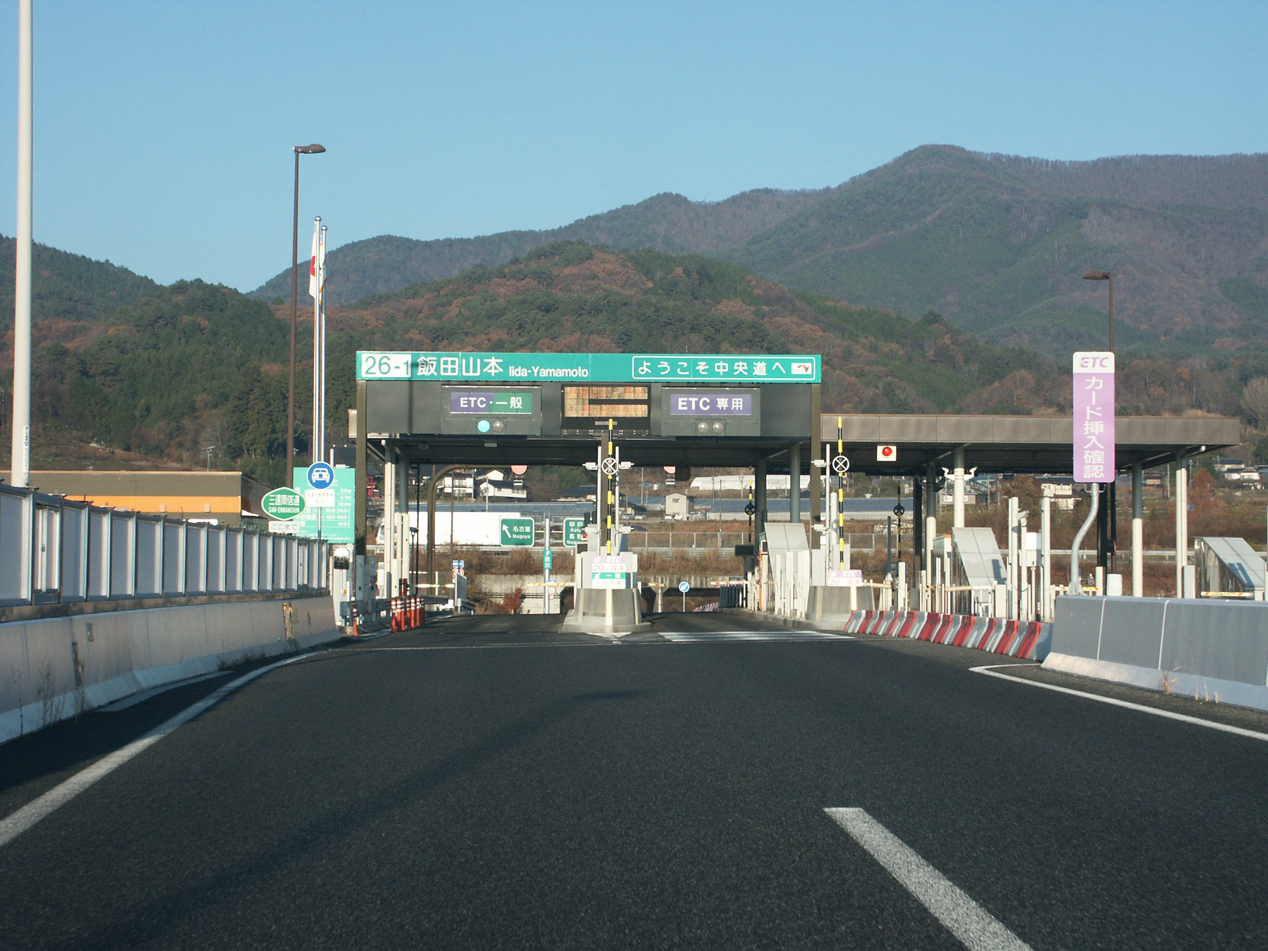 中央自動車道飯田山本インターチェンジ料金所